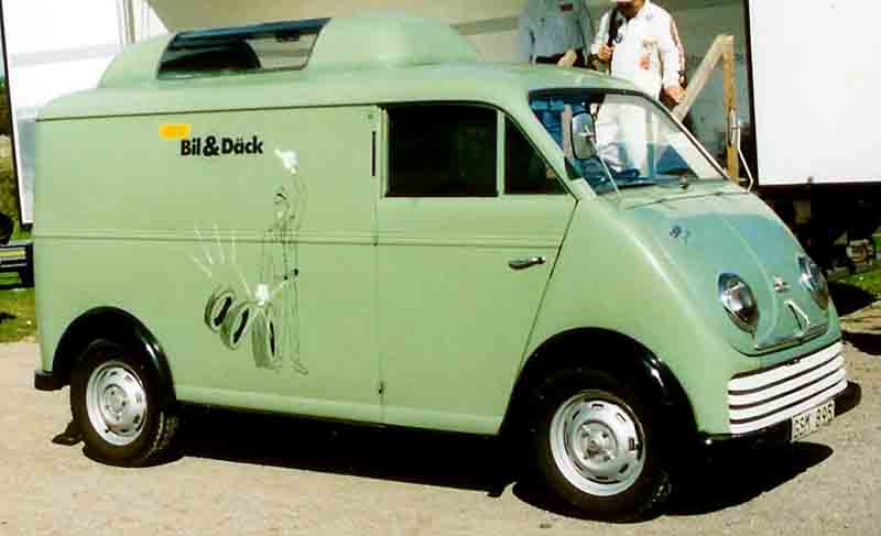 DKW F800 13 1959